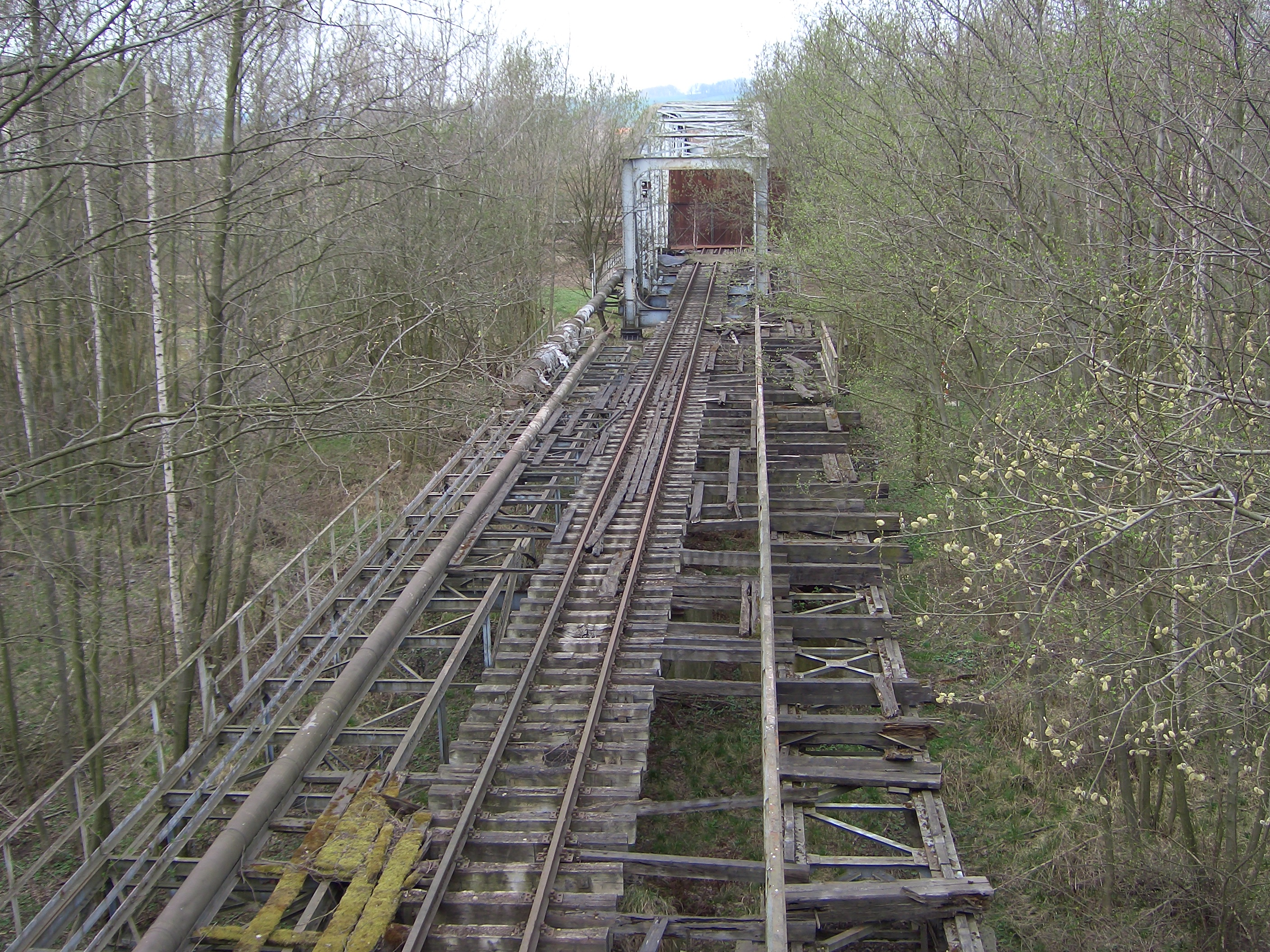 Ansicht der 2009 abgerissenen Aschebrücke von Polen aus. Über die Brücke wurde bis in die 1980er Jahre die Asche in Waggons vom Kraftwerk Hirschfelde zum Tagebau Turów zwecks Verkippung transportiert